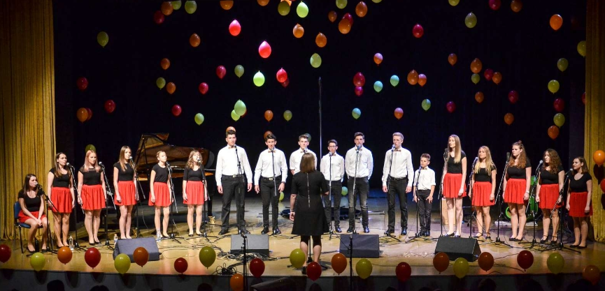 Koncert Skupine Sled, 1. aprila leta 2017 v Kulturnem centru v Rogaški Slatini.